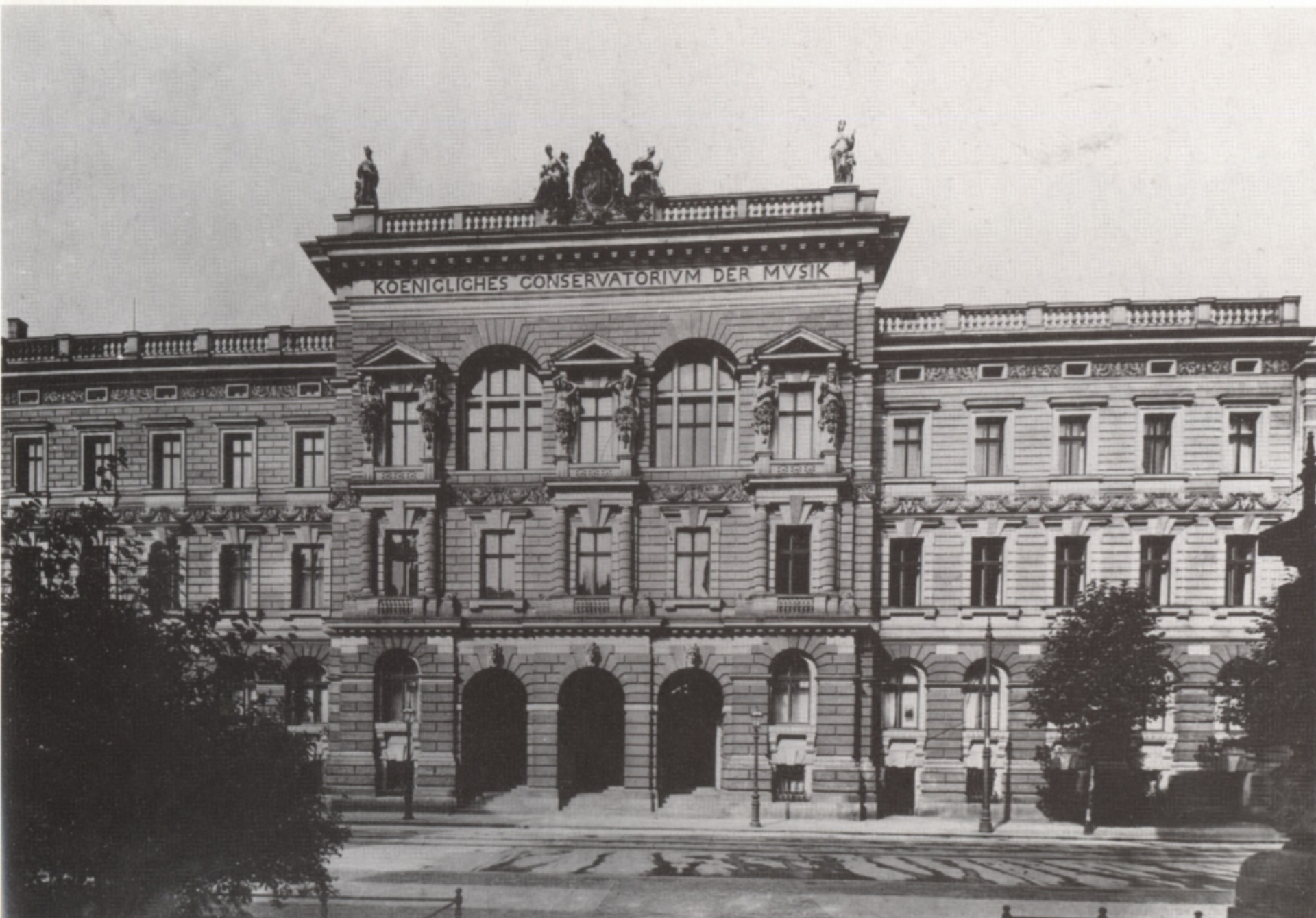 Konservatorium der Musik in Leipzig, Grassistraße 8, Aufnahme um 1910